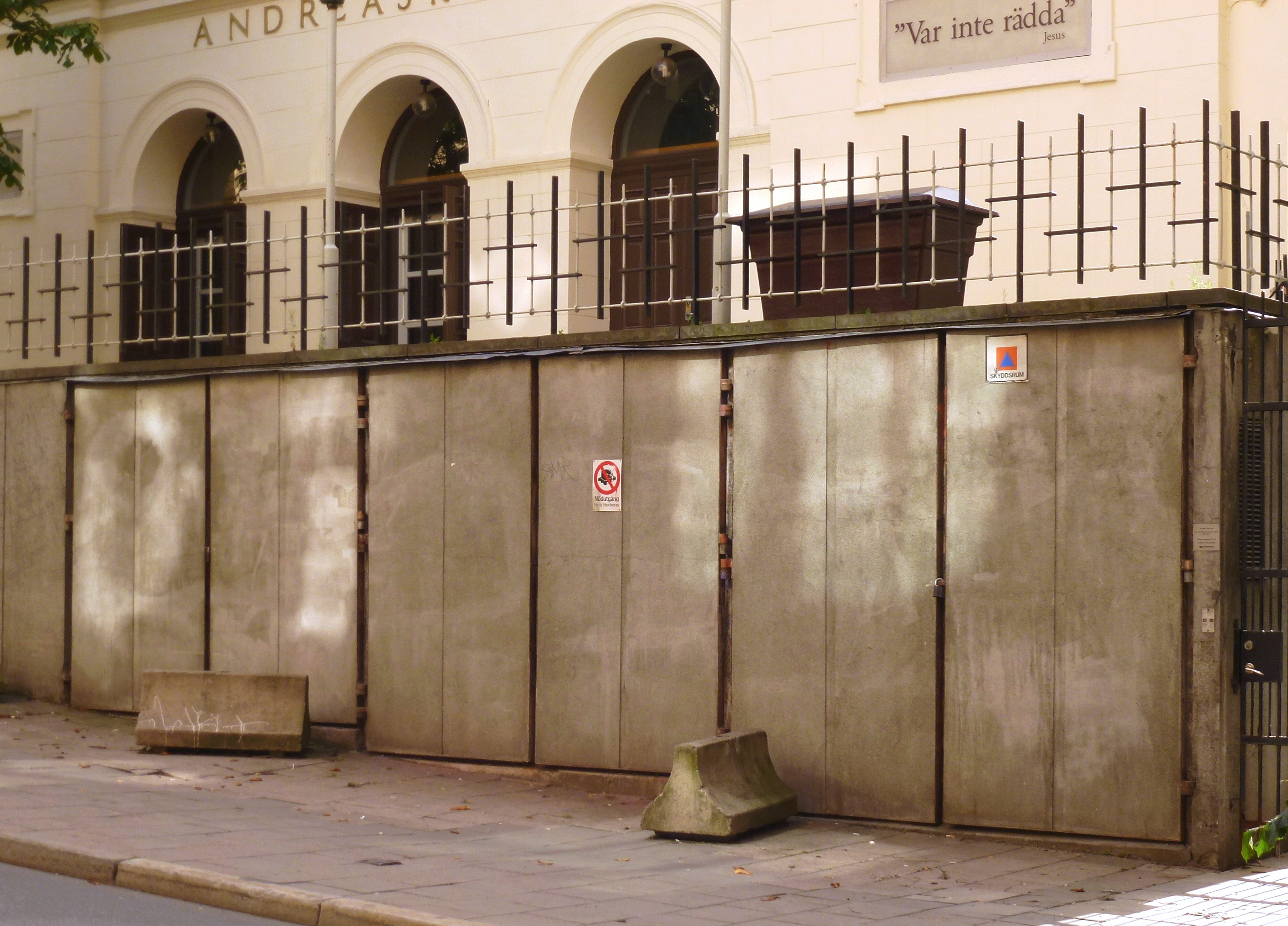 Högbergsgatan, inrymningsväg till Katarina skyddsrum